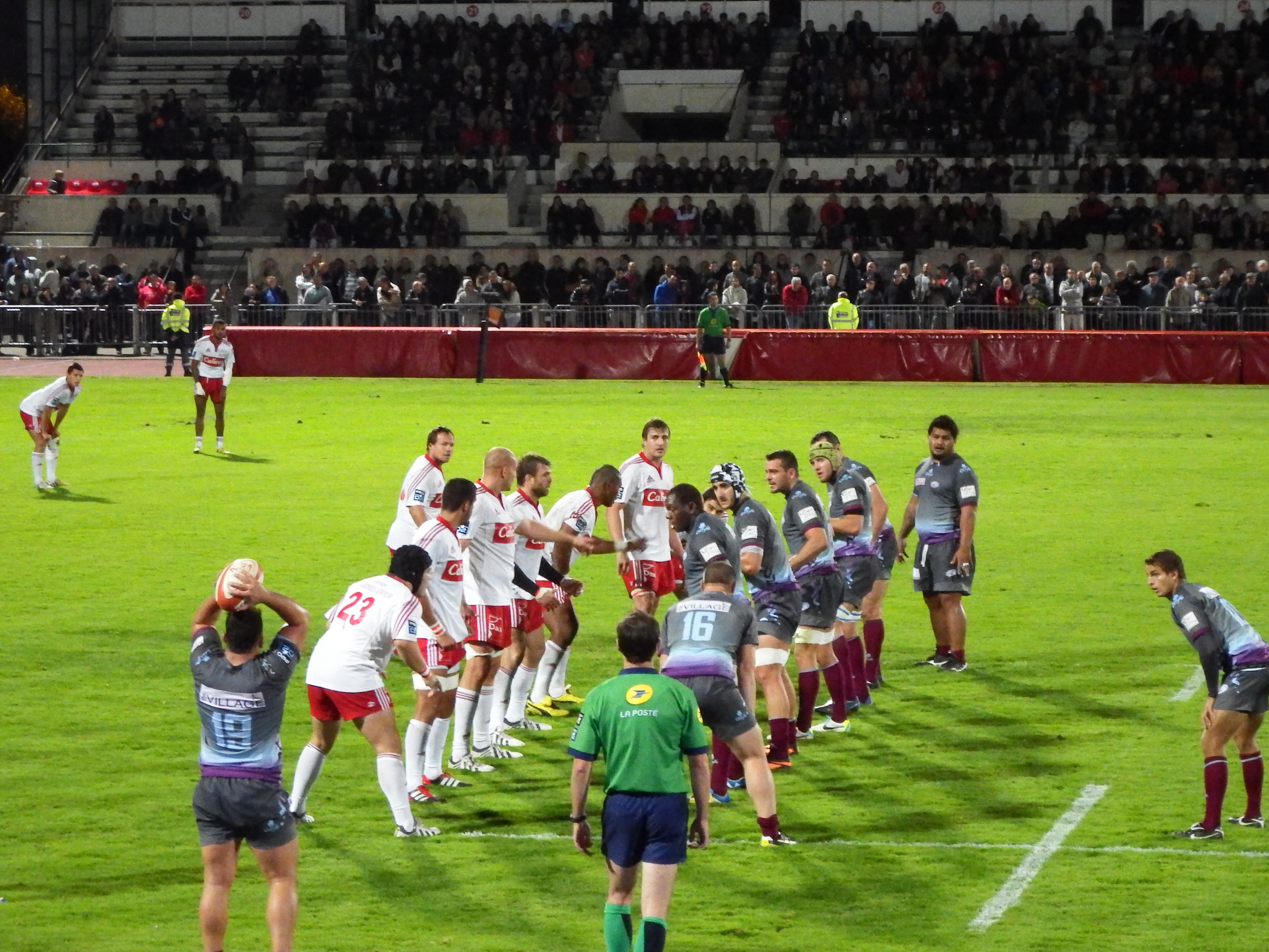 Pro D2 2013-2014 — 12 October 2013, Stade Maurice Boyau. Match between: US Dax — CS Bourgoin-Jallieu